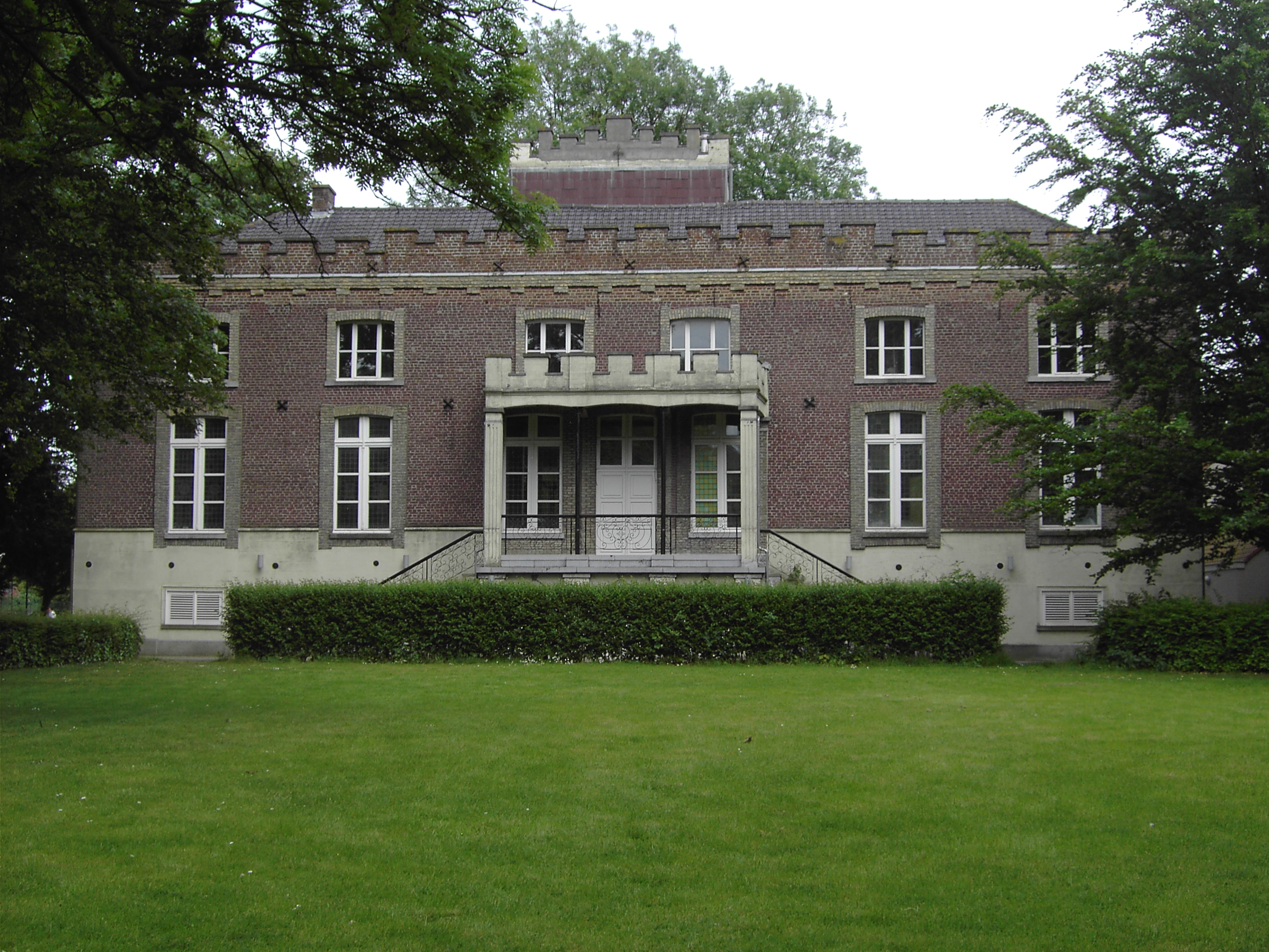 Het is een Kasteel dat in een park staat dichtbij de Sporthal van Deerlijk.